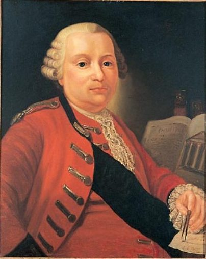 Ritratto dell'architetto Ennemond Petitot (1727-1801)